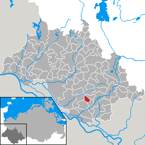 Karenz in Mecklenburg-Vorpommern - district Ludwigslust